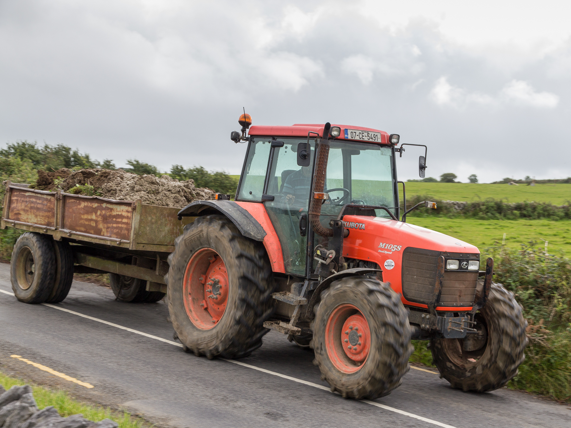 Kubota M105S Traktor im Co. Clare, Ireland